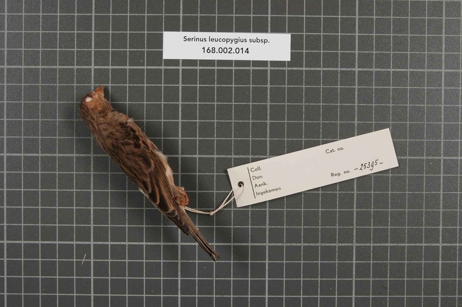 Serinus leucopygius subsp.